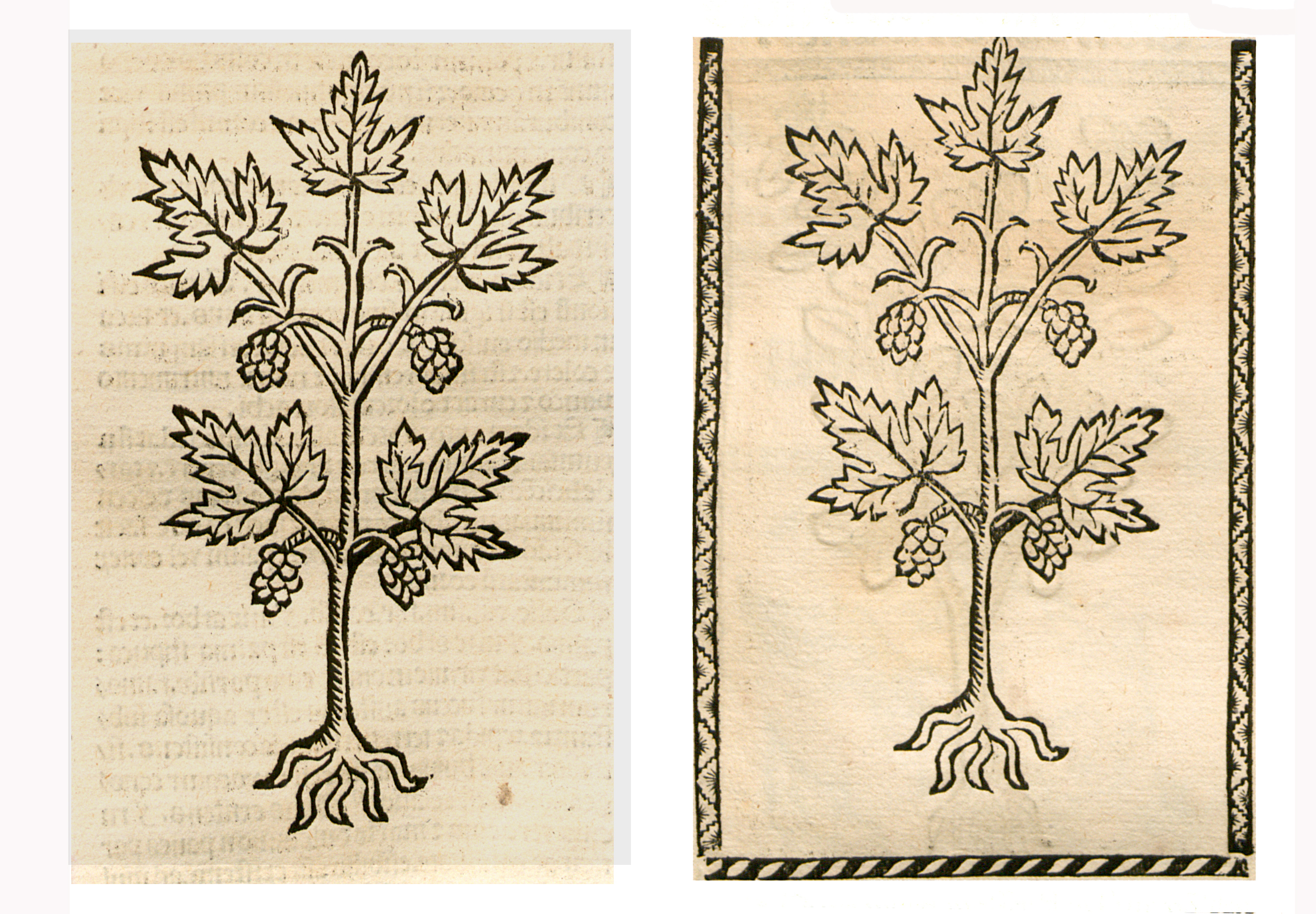 Abbildung von: Kreuzwurz